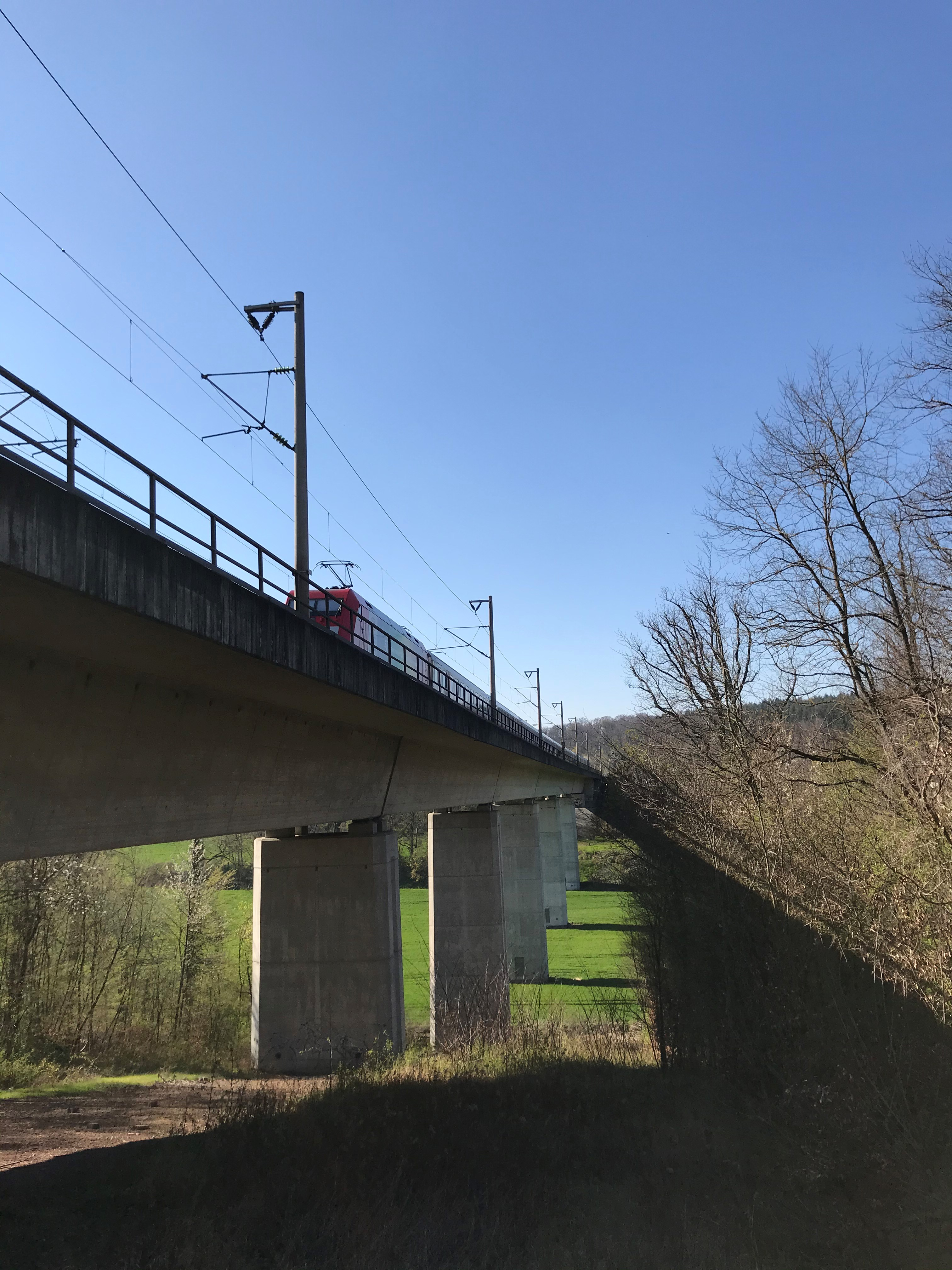 Blick von Süd-Ost etwas unterhalb der Talbrücke Oberbruch; ein IC Richtung Heidelberg/Mannheim fährt gerade über die Brücke